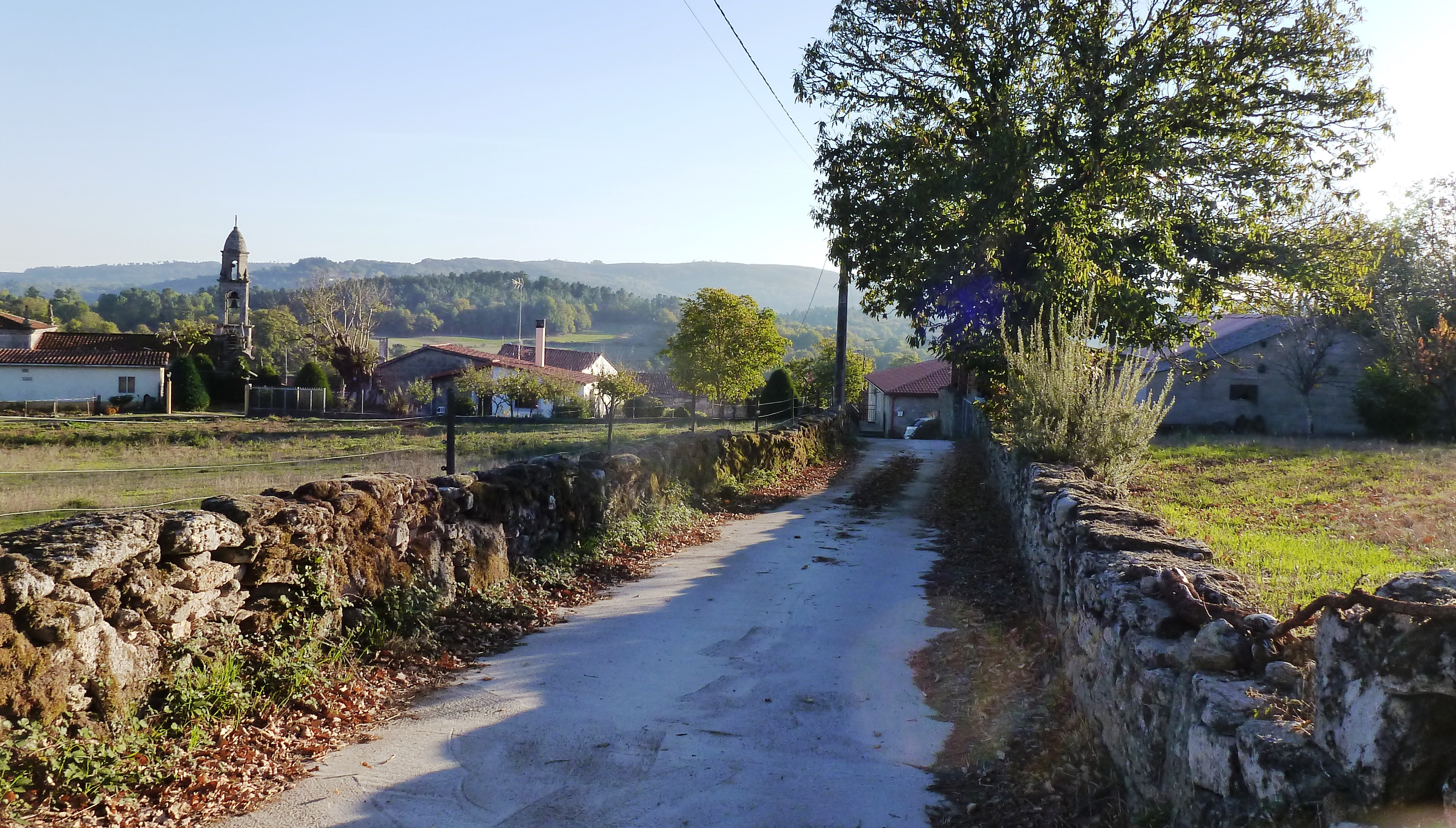 San Mamede, San Mamede, Carballedo